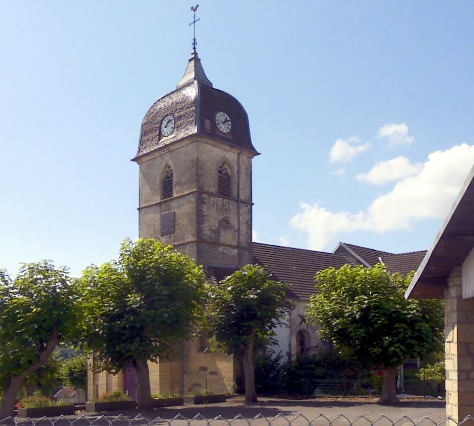 L'église Saint-Martin de Polaincourt, commune de Polaincourt-et-Clairefontaine